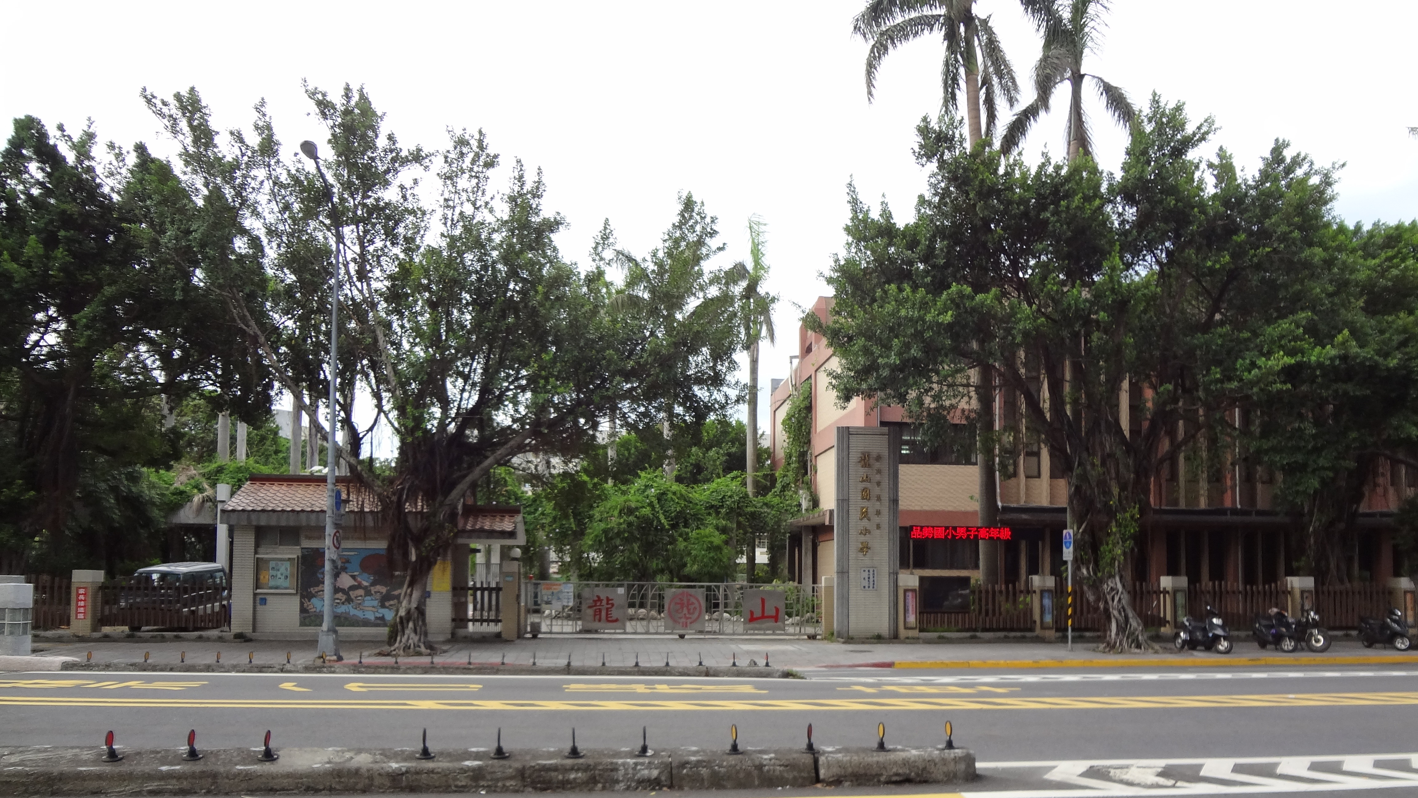 中文（台灣）: 臺北市萬華區龍山國民小學和平西路校門。